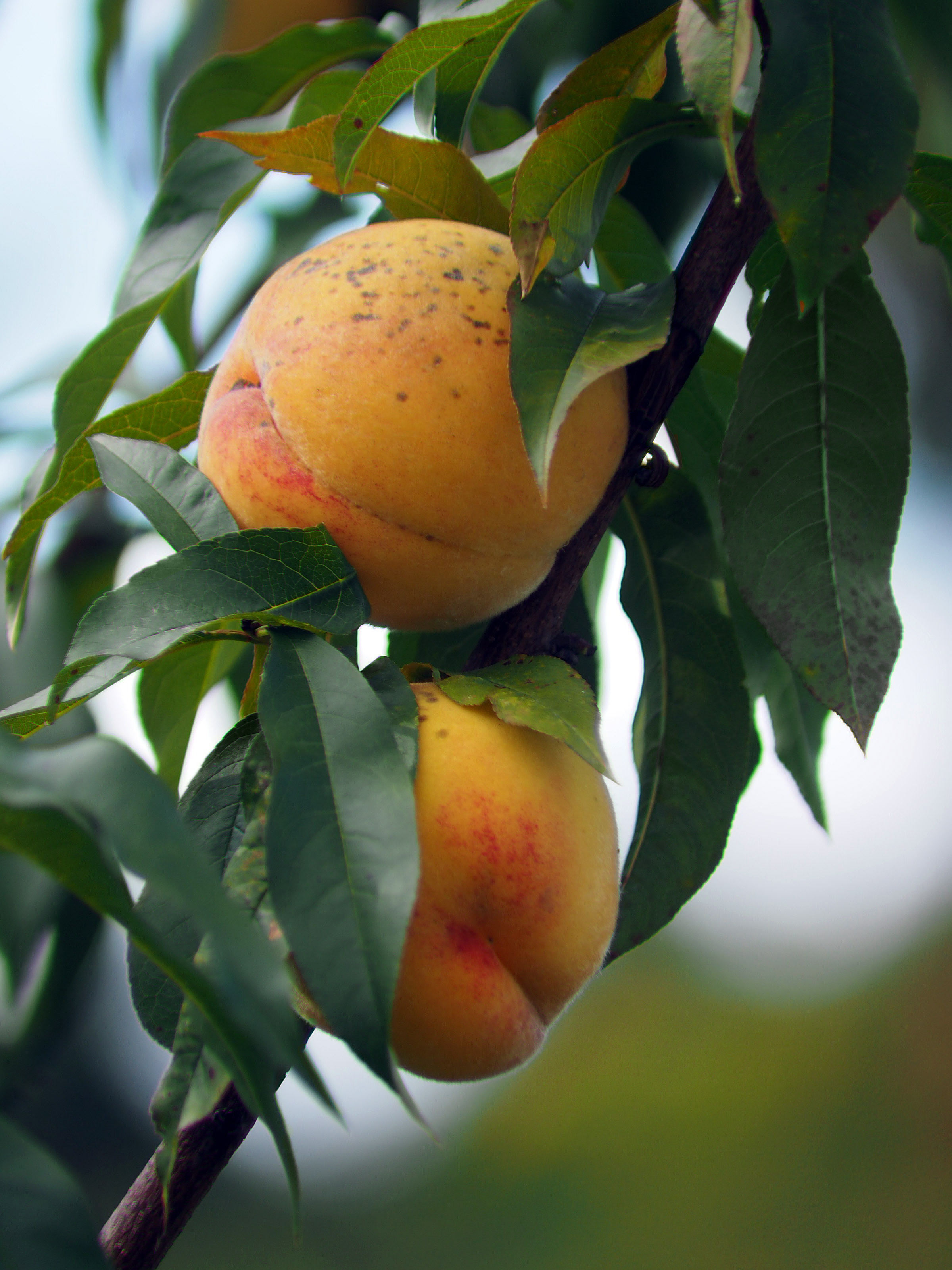 Reife Pfirsichfrüchte mit einem Durchmesser von zirka acht Zentimetern.